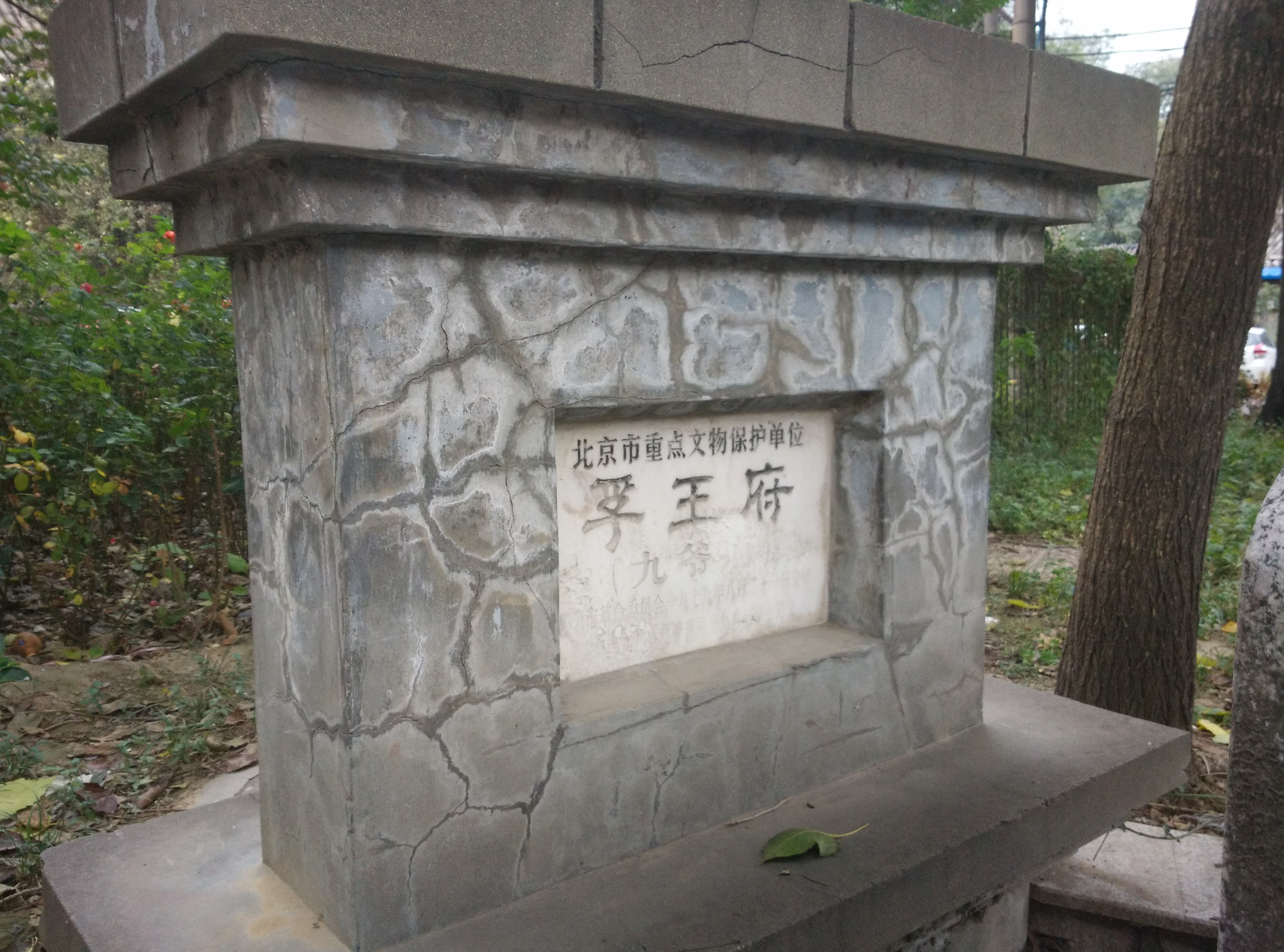 中文（中国大陆）: 孚王府的北京市文物保护单位标志碑